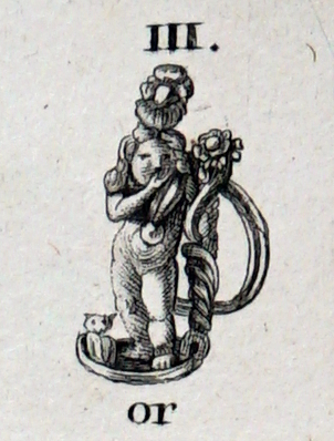 trouvé au mont la clappe proche de Narbonne,planche publiée dans le tome III.